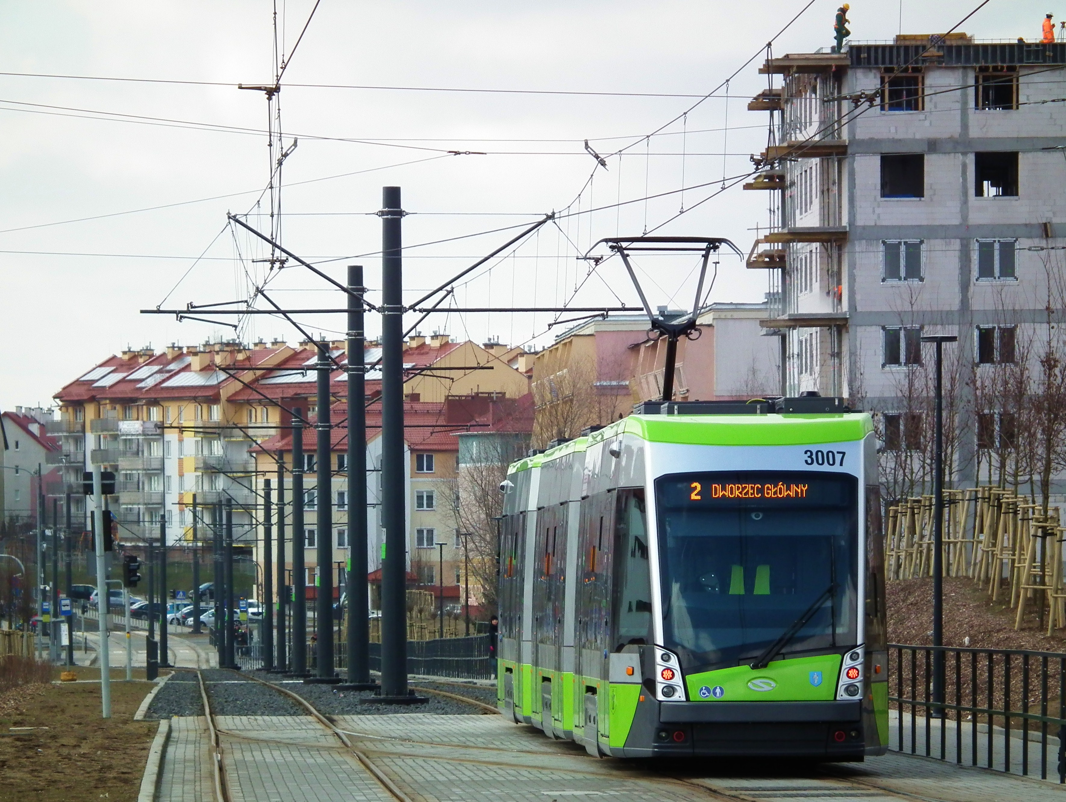 Tramwaje olsztyńskie A.D. 2016.